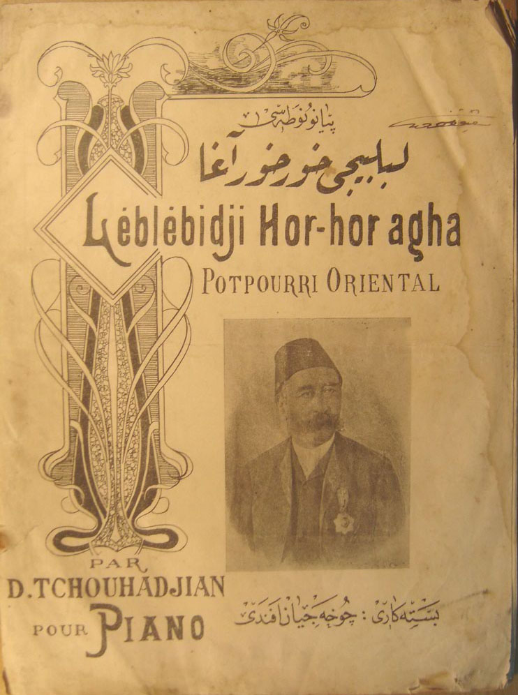 Издание партитур оперетты «Леблебиджи Гор-гор ага»